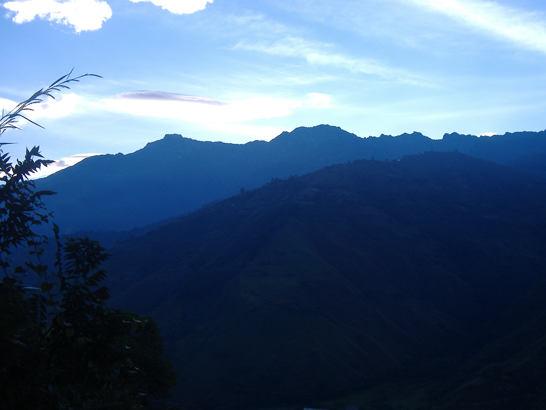 Vista de la Sierra Nevada de Mérida desde la ciudad de Mérida, Venezuela. Fotografía de Jorge Paparoni, diciembre de 2005. Para uso externo favor nombrar fuente y fotógrafo.